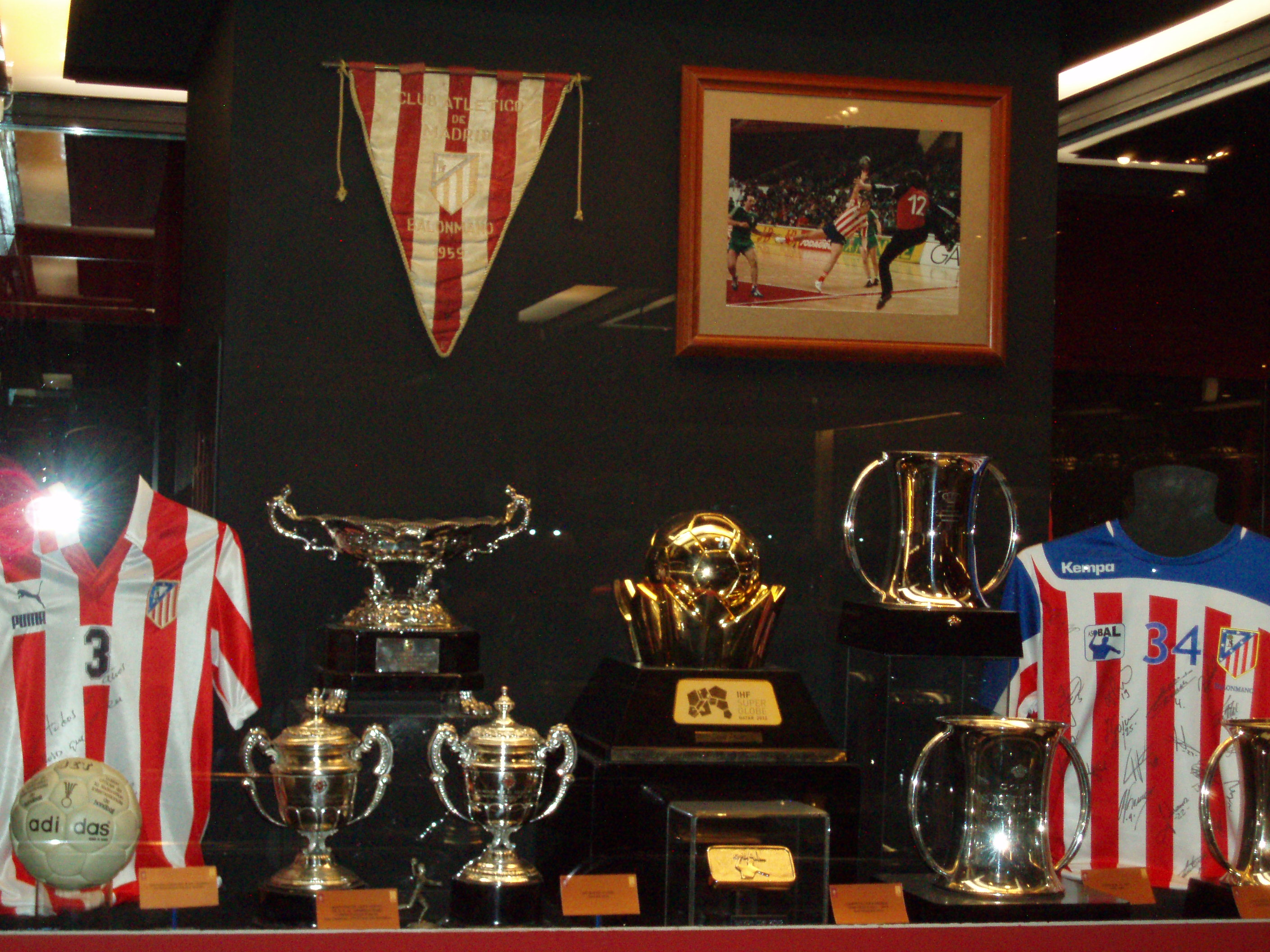 Vitrina con varios trofeos conseguidos en las dos etapas del atlético de Madrid de balonmano.